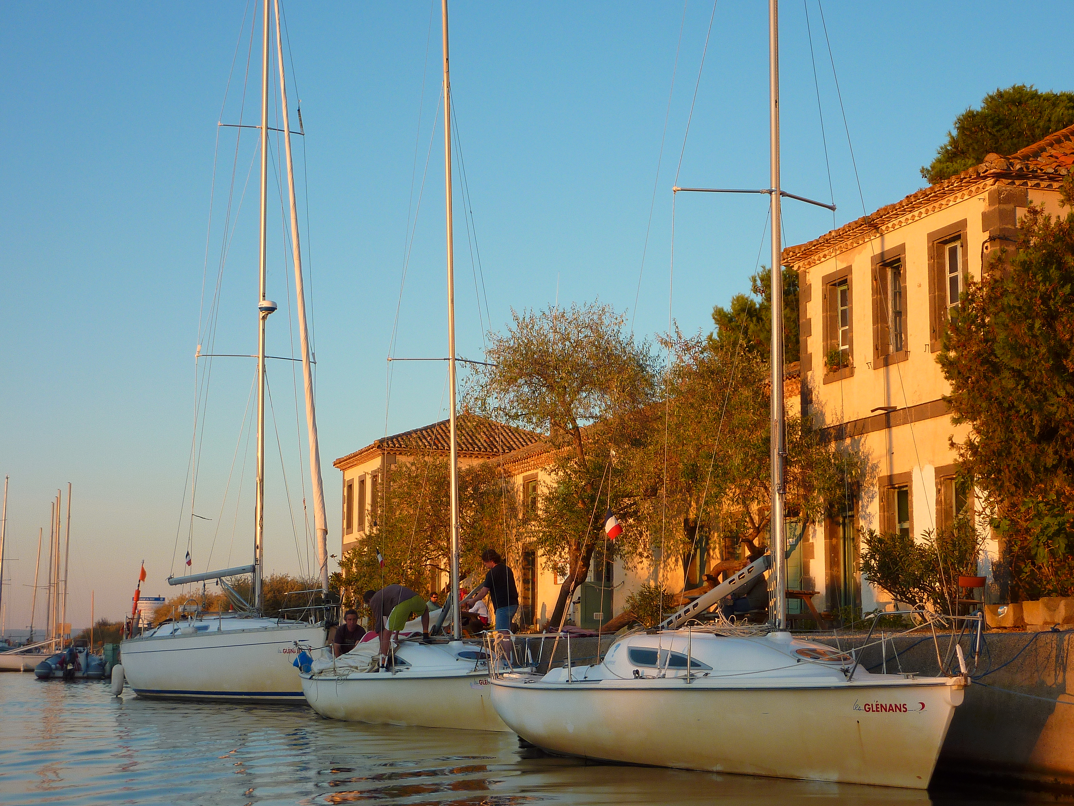 Bateaux des Glénans (au milieu et à droite: type Surprise) au quai à la base des Glénans à Marseillan